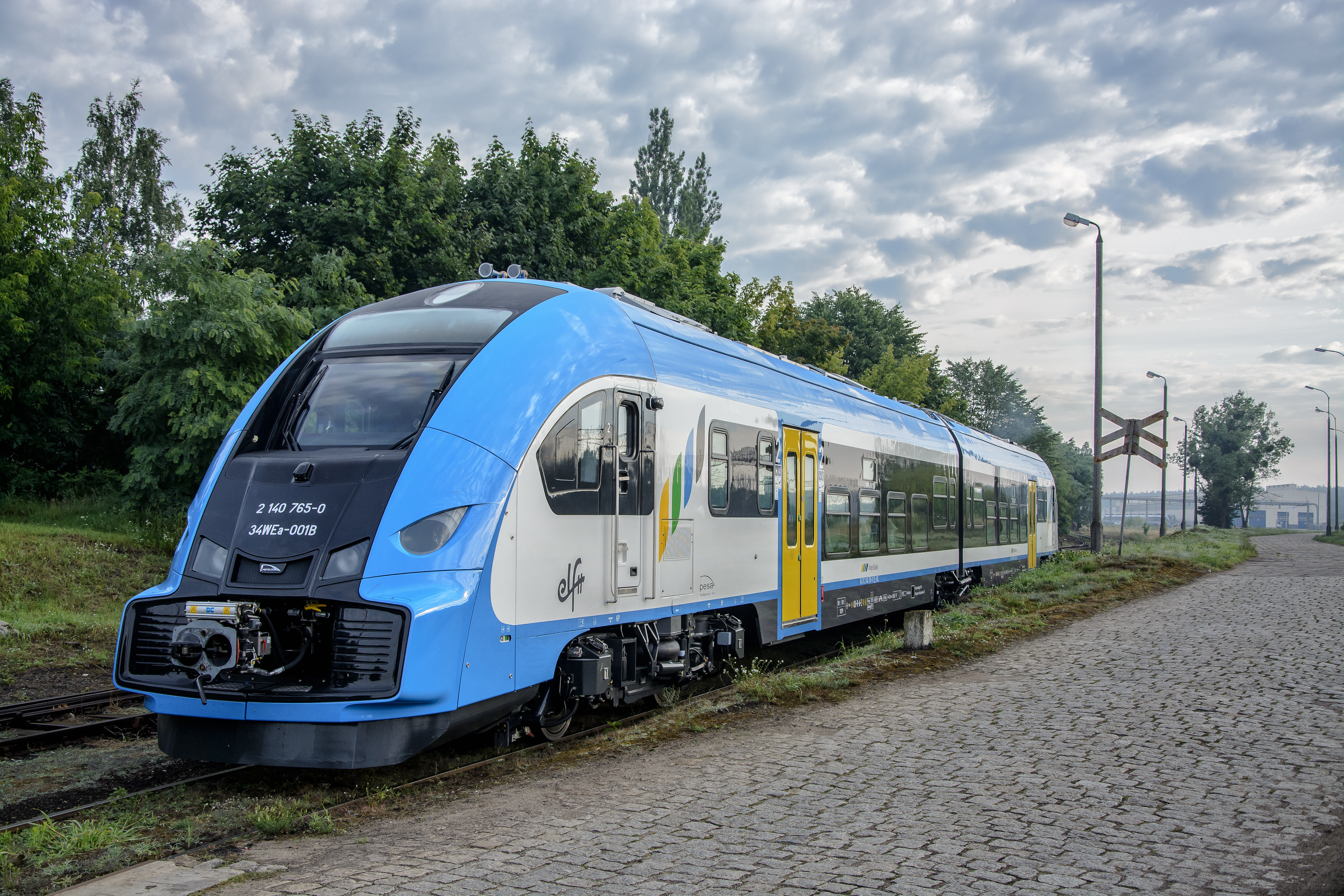 Elektryczny zespół trakcyjny Pesa Elf II 34WEa-001 dla Kolei Śląskich stoi na terenie Pesy Bydgoszcz.